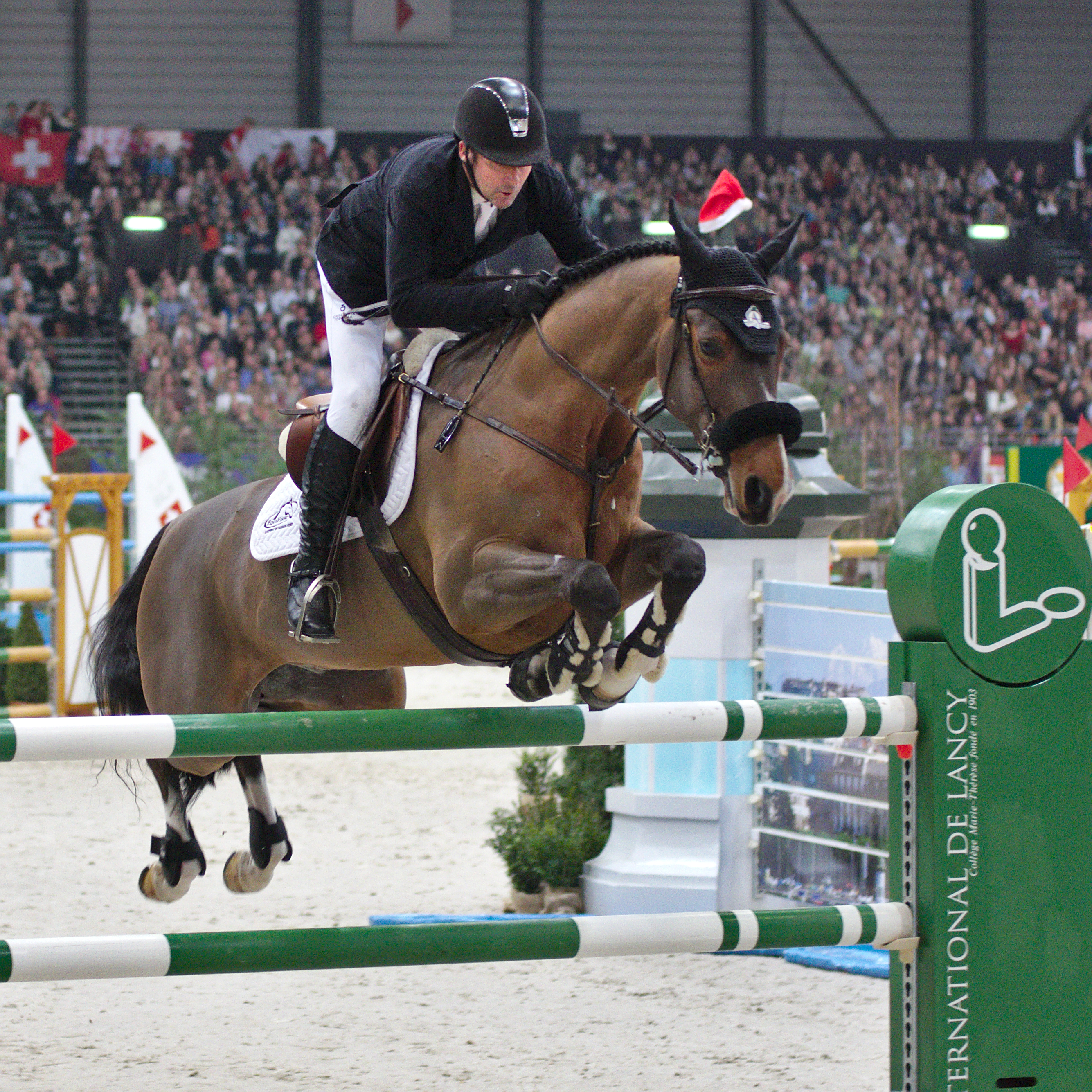 CHI Genève 2013 - 20131214 - Eric Lamaze et Quelmec du Gery